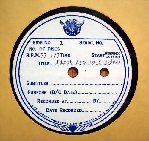 Es una foto de un disco de acetato.